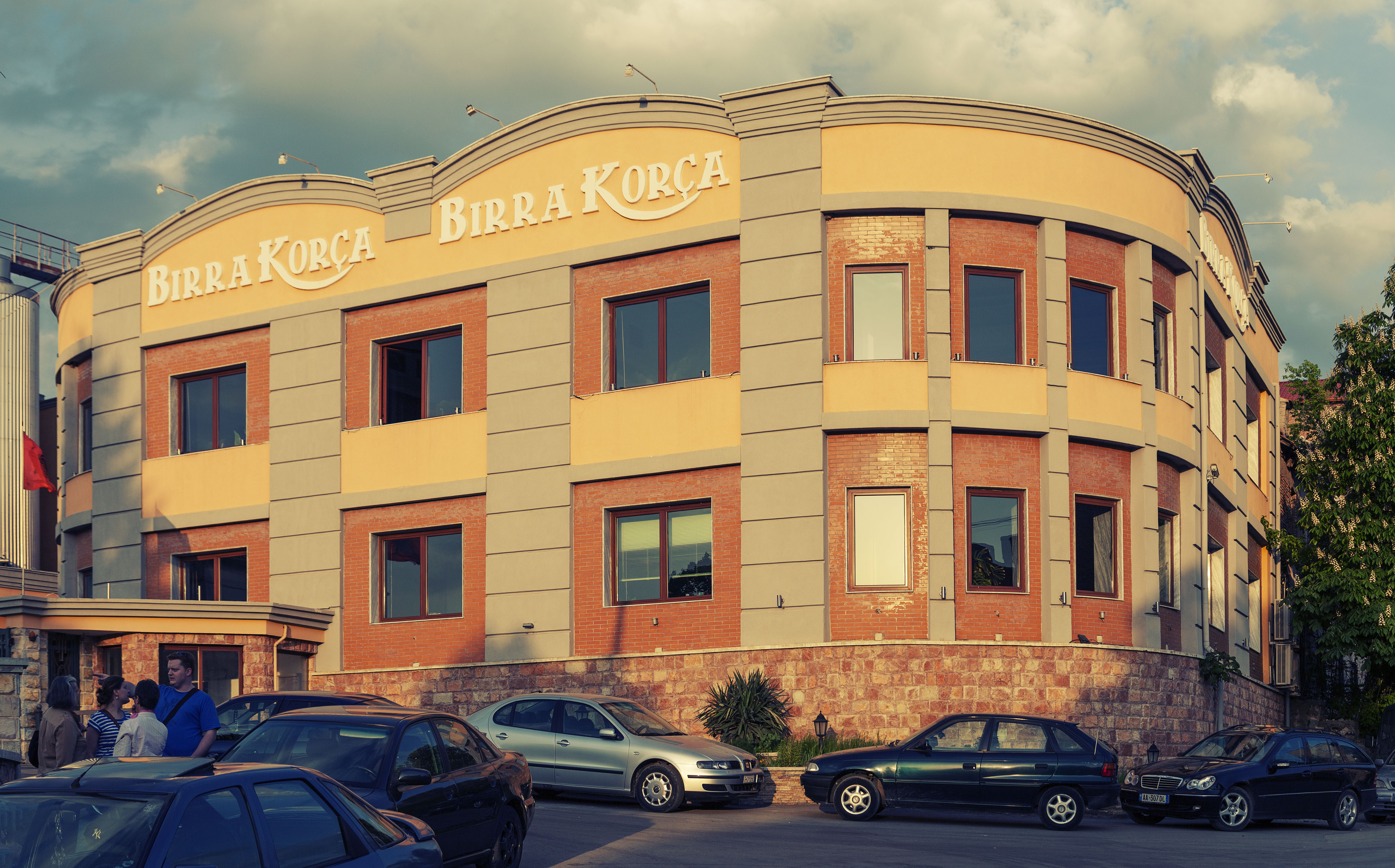 Korçë, Albania